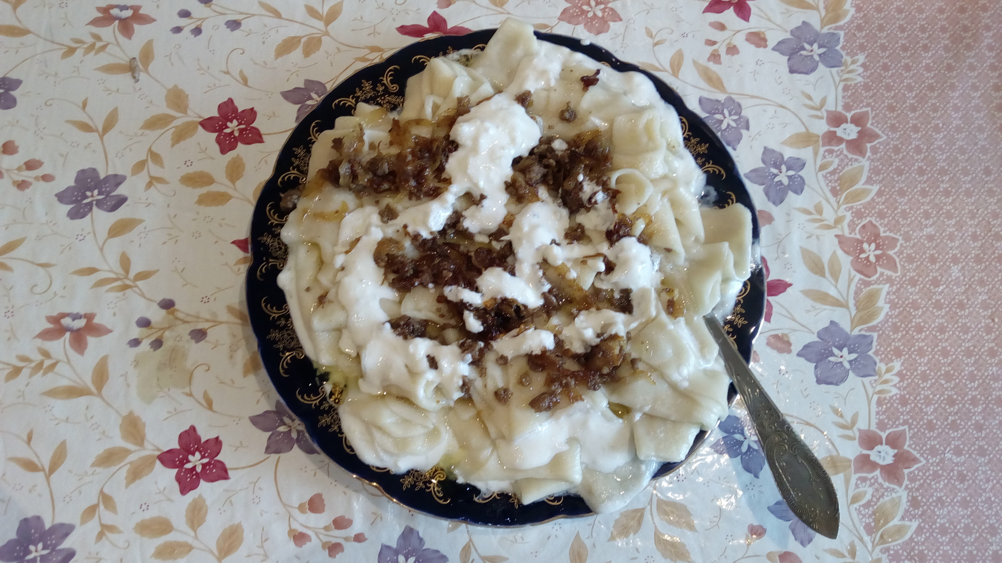 Yarpaq xəngəli Daha ətrafı: bu videoda